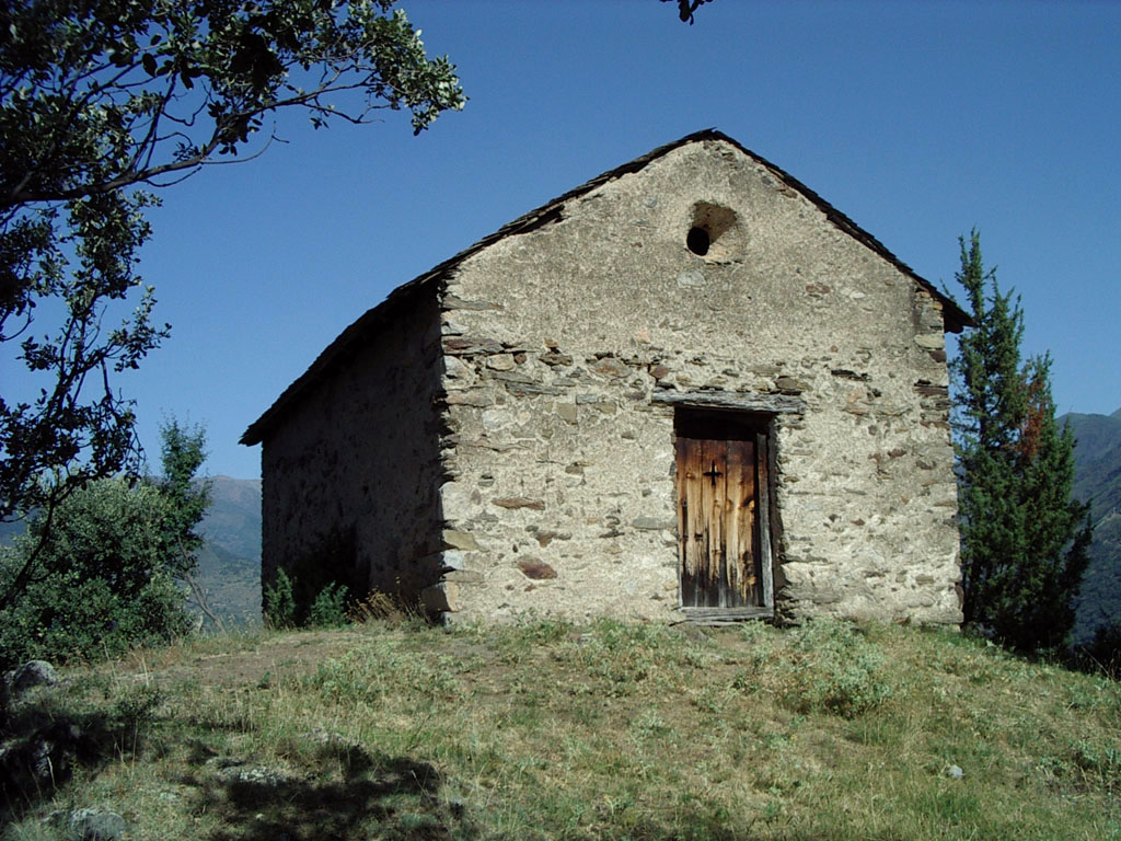 Ermita de Sant Roc de Llavorre